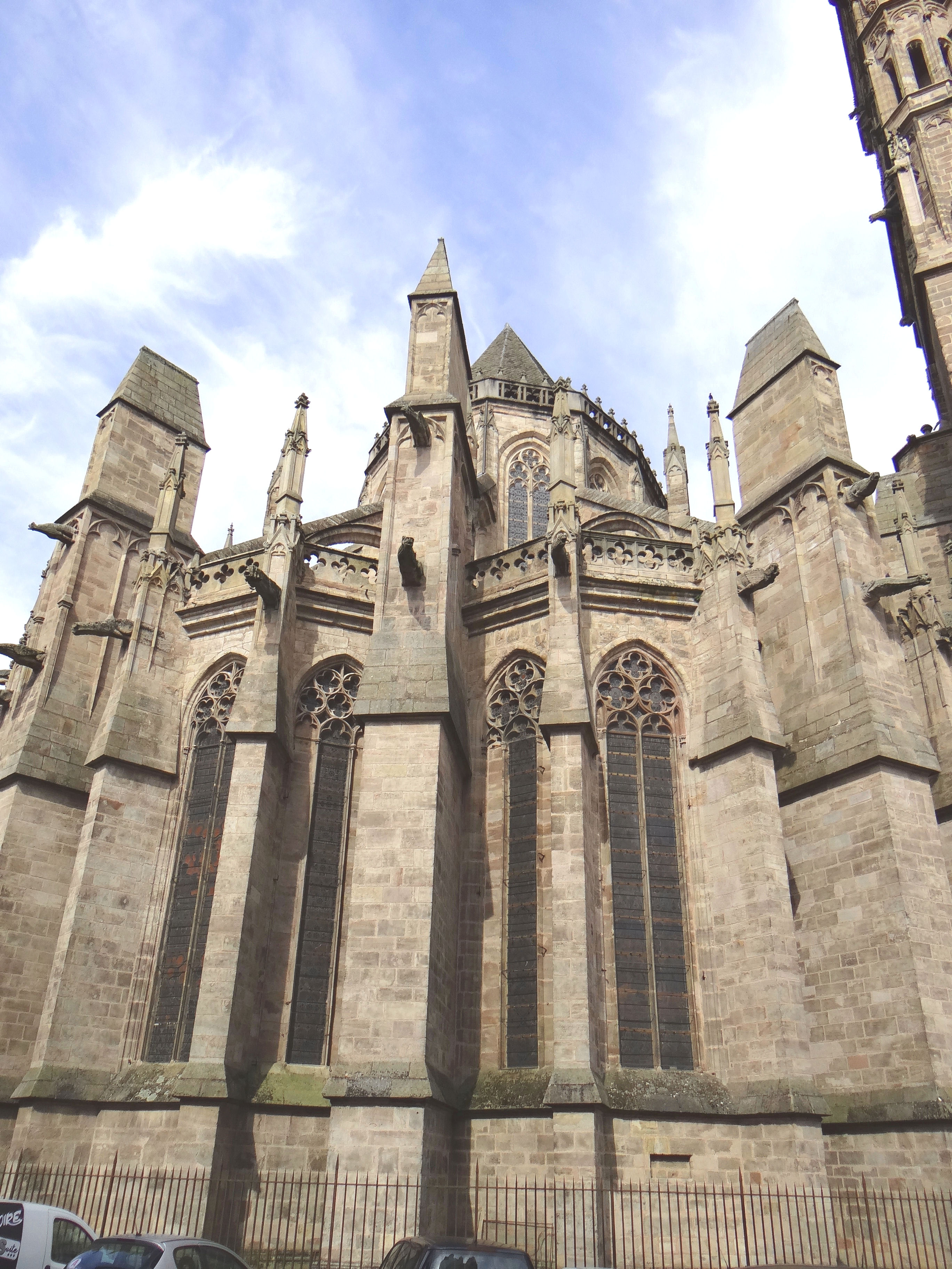 Rodez - Cathédrale Notre-Dame - Chapelles rayonnantes du chevet